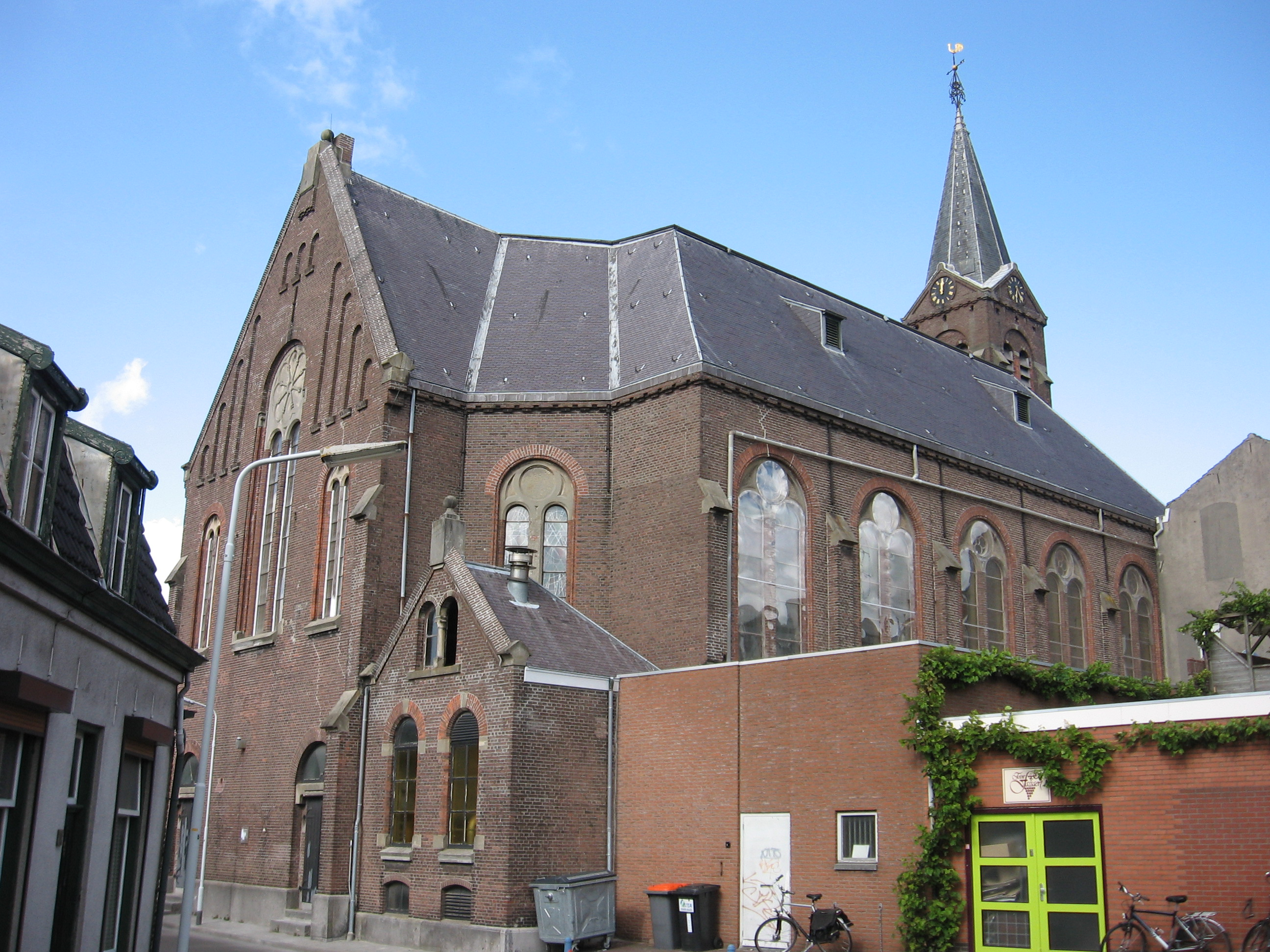 Terneuzen, Ned Herv. kerk (Noordstraat)